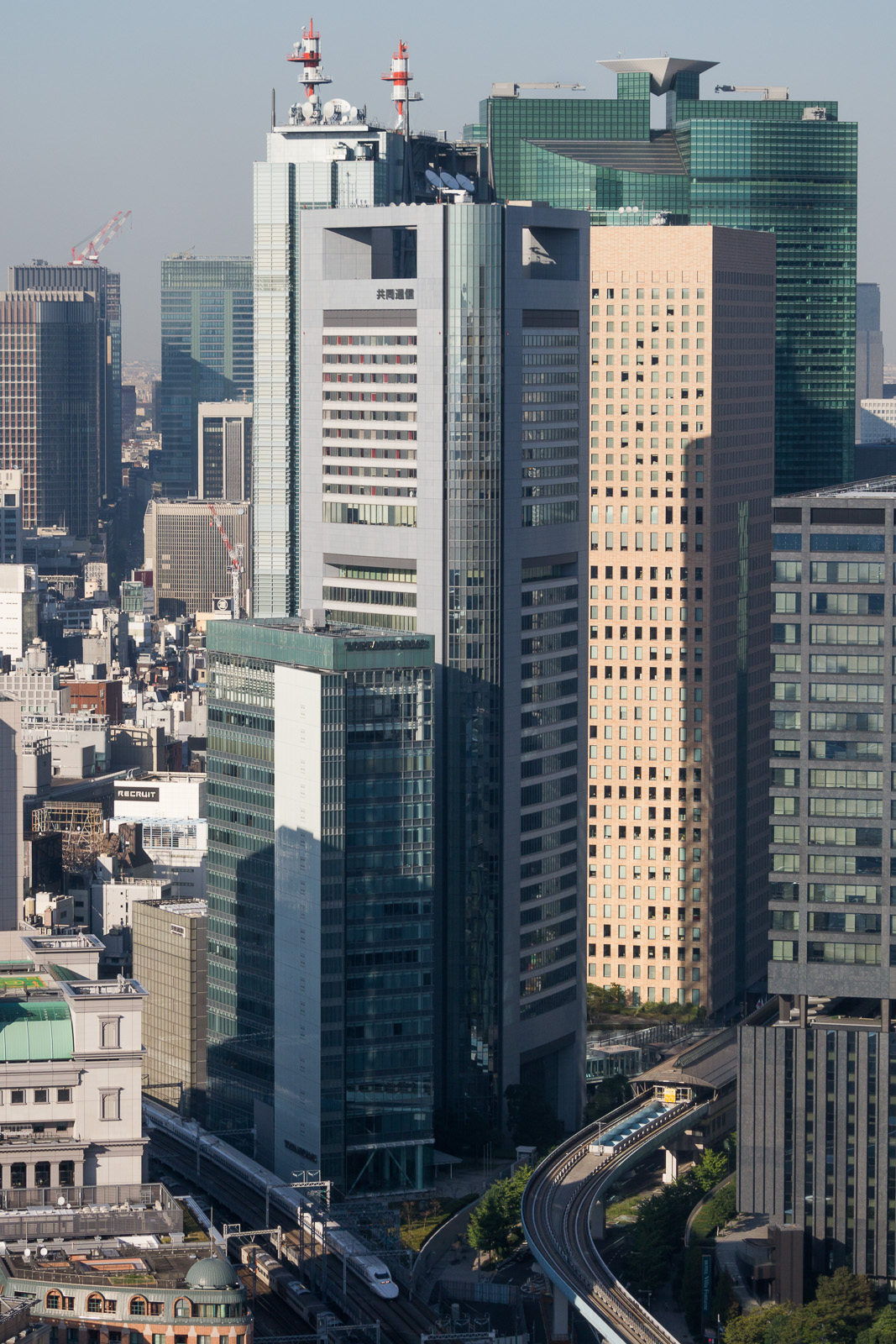 浜松町世界貿易センタービルから見る汐留の高層ビル群。